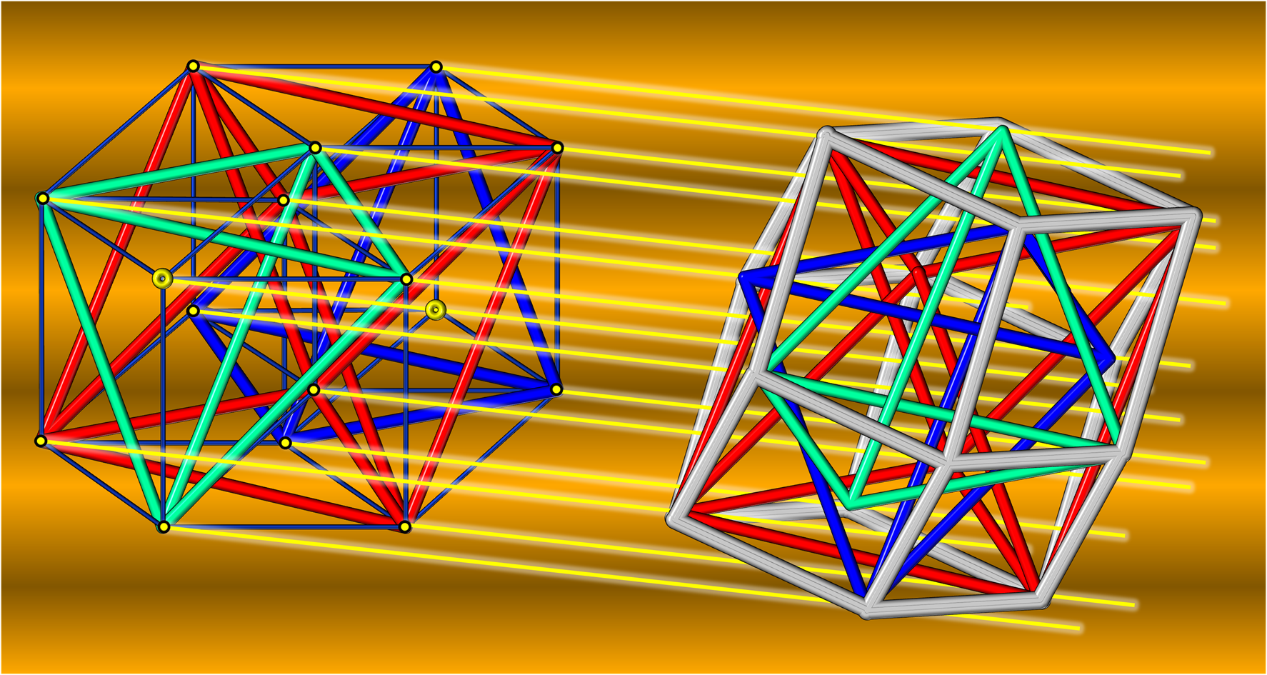 Sezioni ortoassiali del tesseratto e loro proiezione ortoassiale. L'inviluppo esterno delle proiezioni delle sue sezioni ortoassiali, rappresentate da due Tetraedri regolari e da Ottaedro regolare, rappresenta un Dodecaedro rombico.